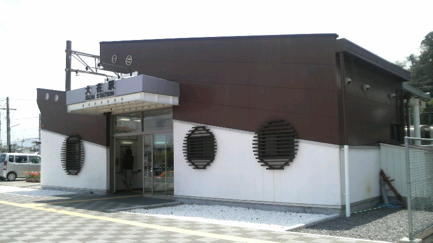 大分市大在にある、JR日豊本線大在駅の駅舎。投稿者が2008年4月18日に撮影。